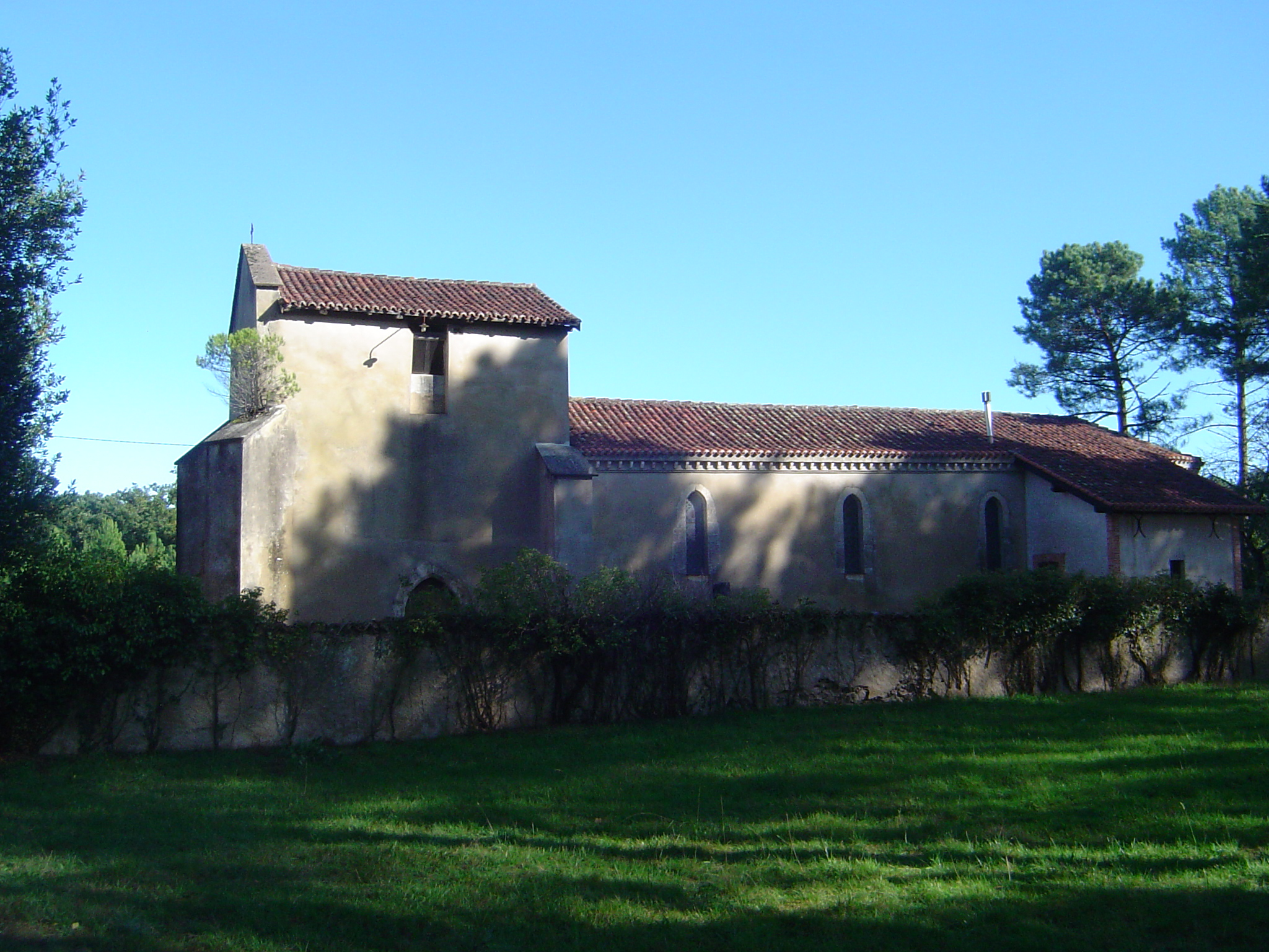 glèisa de St Vincenç de Micse; Lit e Micse; Gasconha